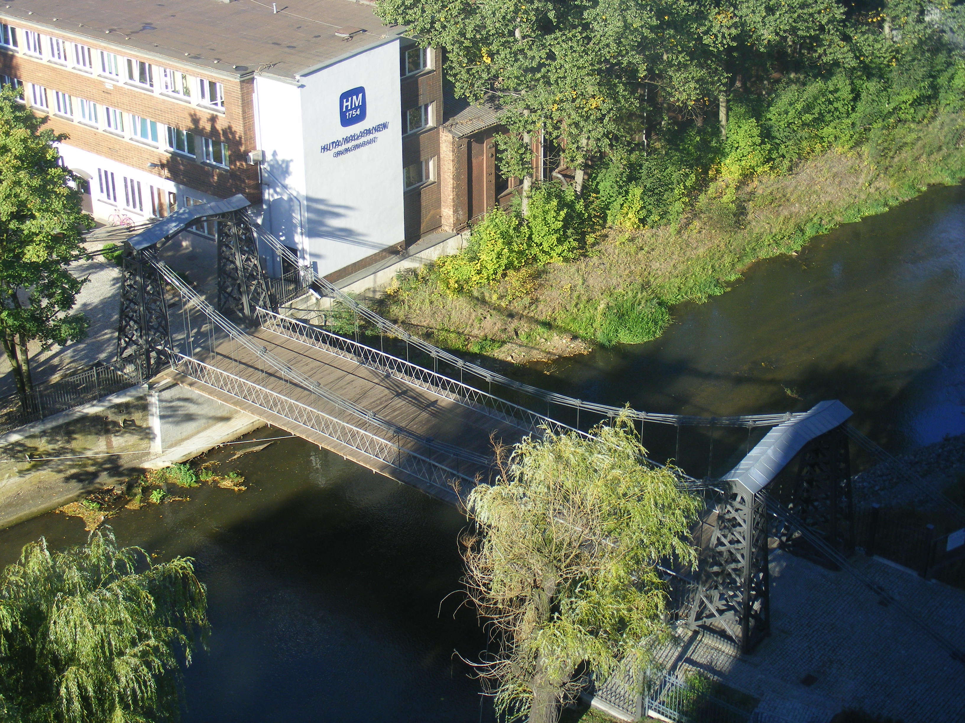 Zabytkowy most wiszący w Ozimku woj opolskie. Nr zabytku; A-1940/69. Widok z biurowca.